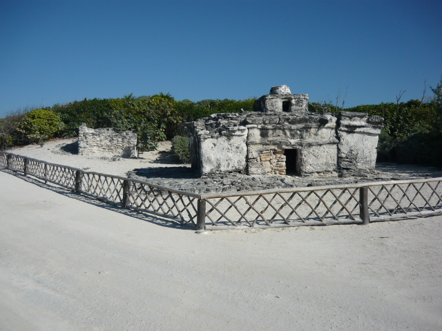 Estructura El Caracol en Punta Sur, Cozumel, Quintana Roo, México. Junto al faro Celarain.